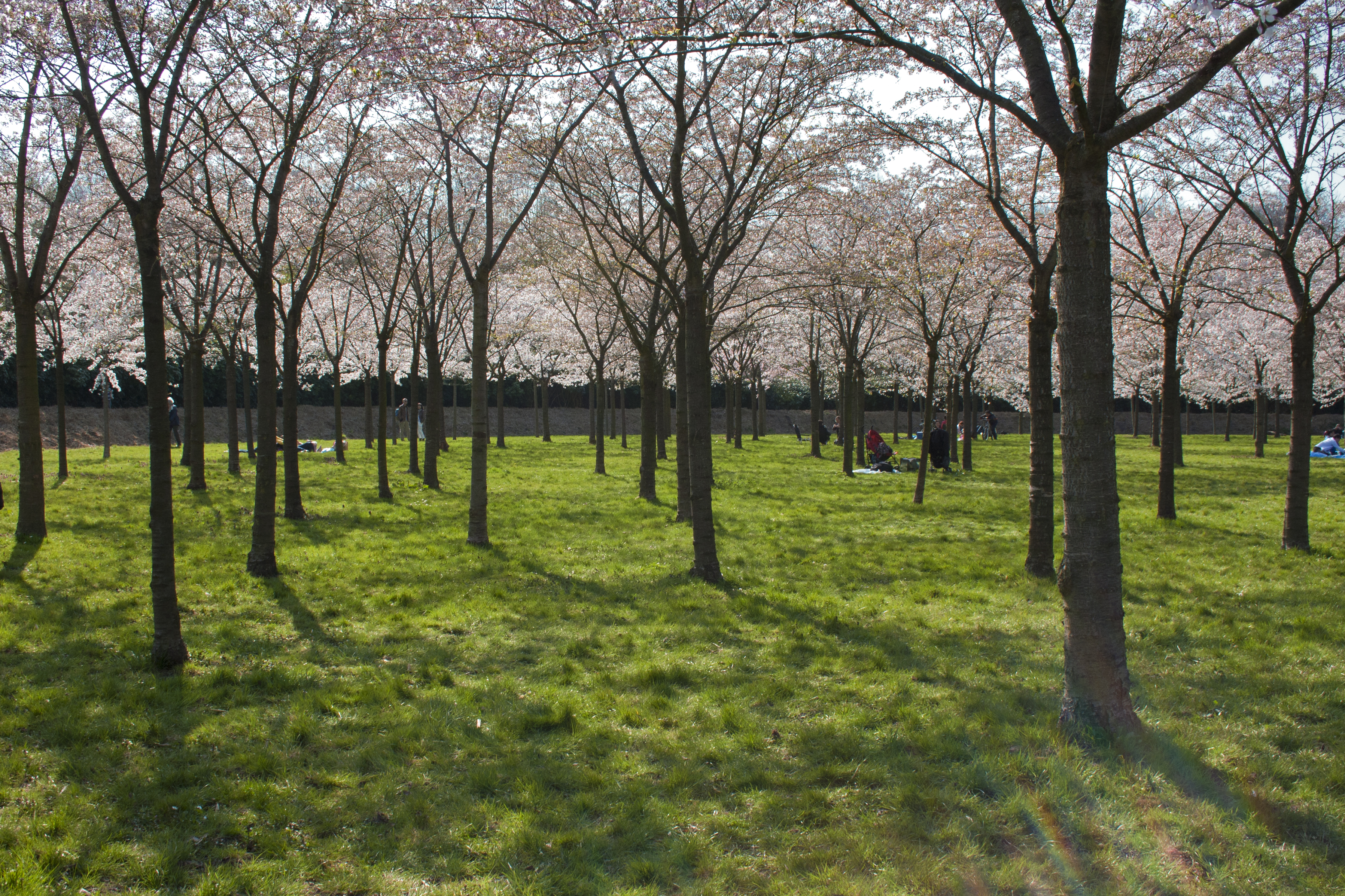 Zicht op een deel van het Kersenbloemsempark in het Amsterdamse Bos